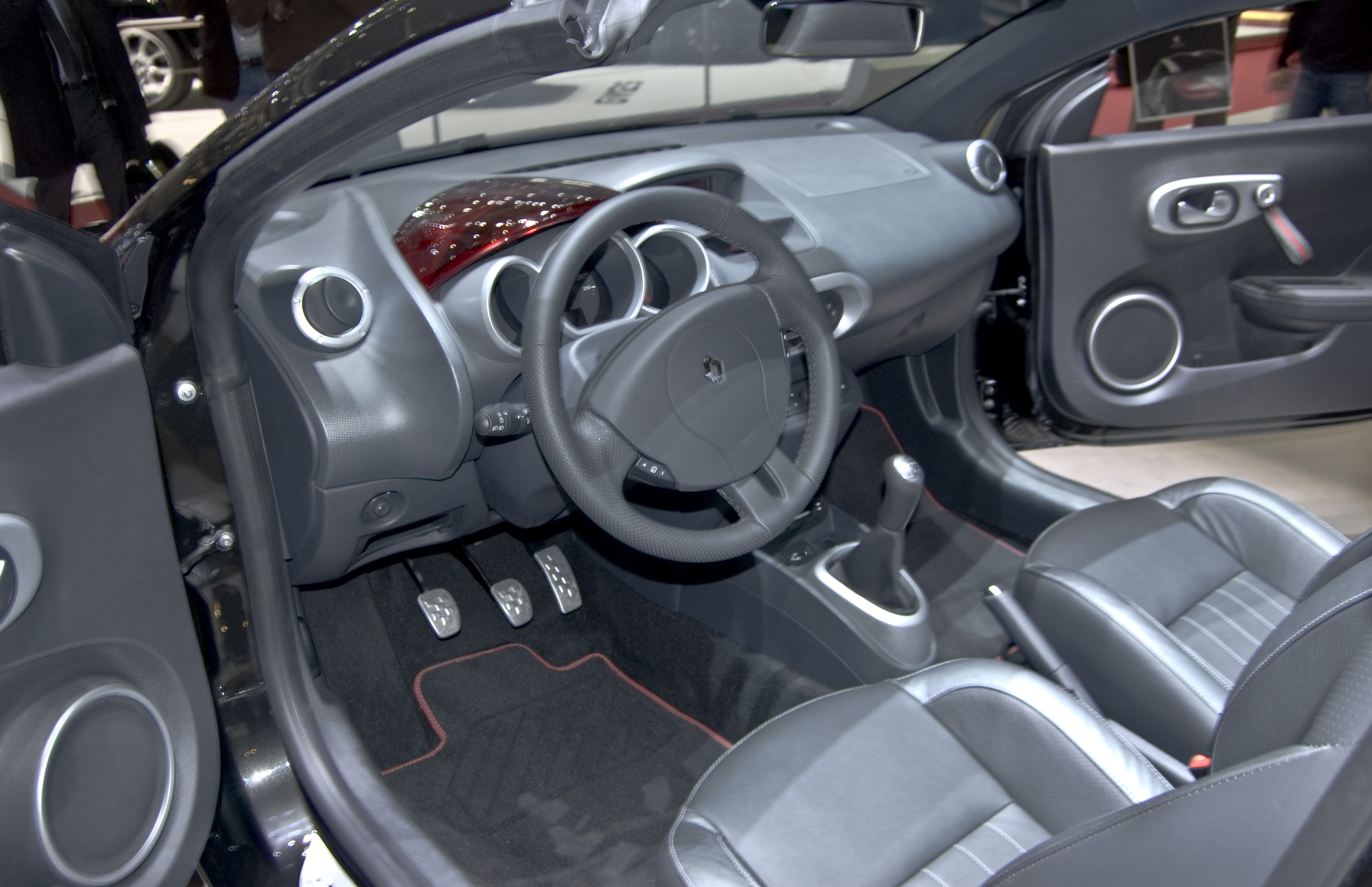 Renault Wind en el Salón de Ginebra 2010.